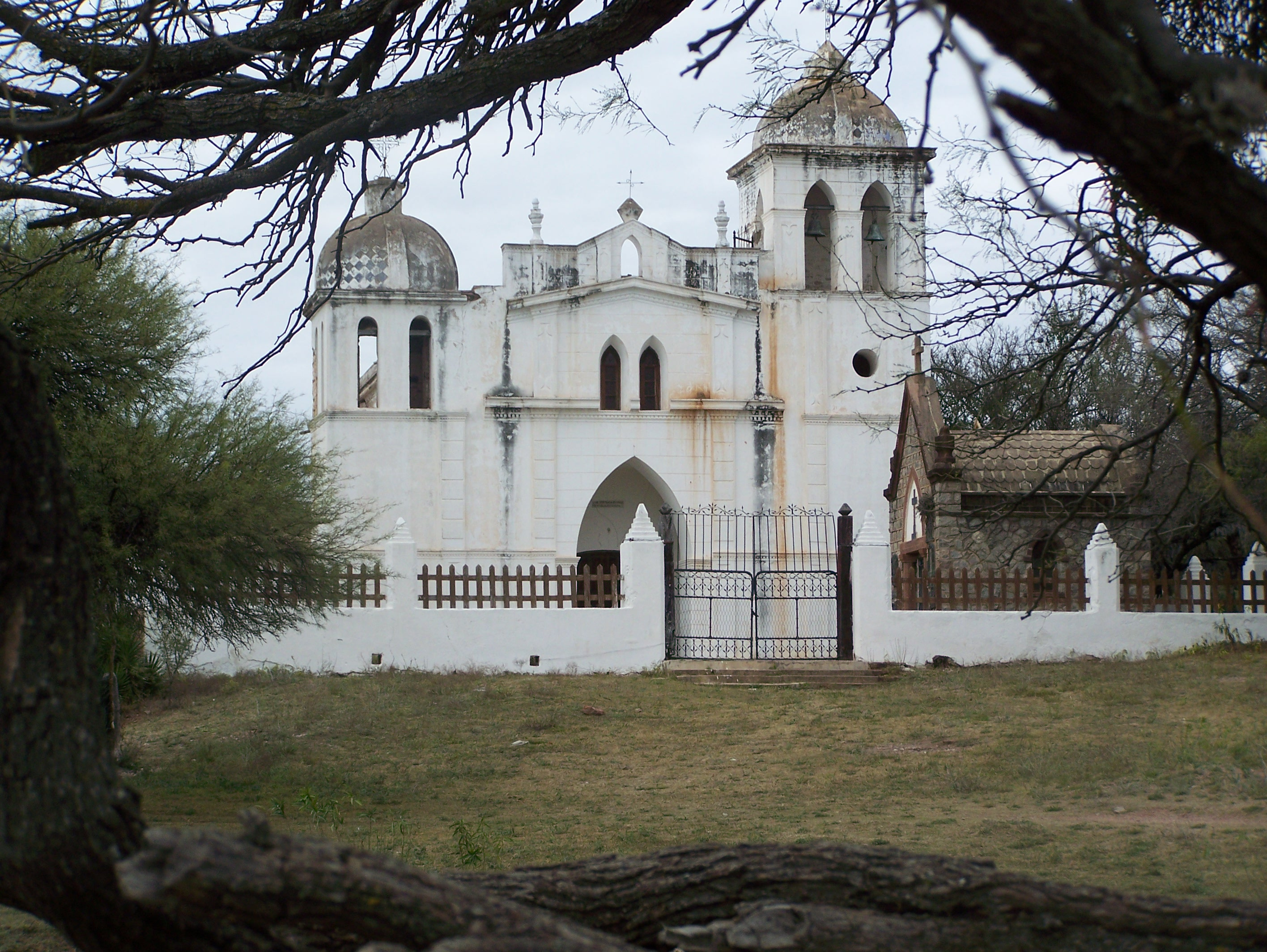 Iglesia de Copacabana, Cordoba, Argentina